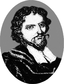 Stanislaw Orikhowskij